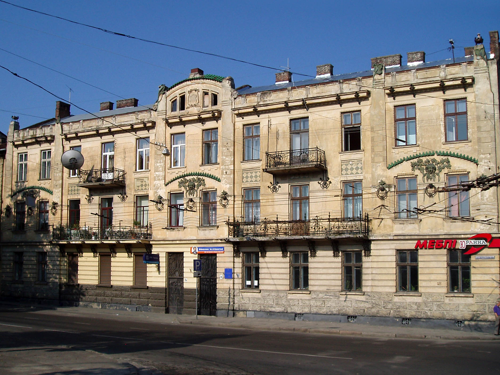 Дім № 8-8а на вулиці Руставелі у Львові. Збудований у 1906 році за проектом Владислава Садловського.